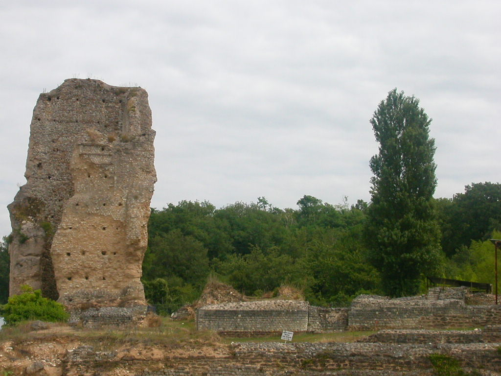 Théâtre gallo-romain de la cité de Lemonum, Naintré, Poitou, FranceBrezhoneg: C'hoariva Lemonum, ker gallian-roman, Naintré, Poetou, Bro C'Hall .